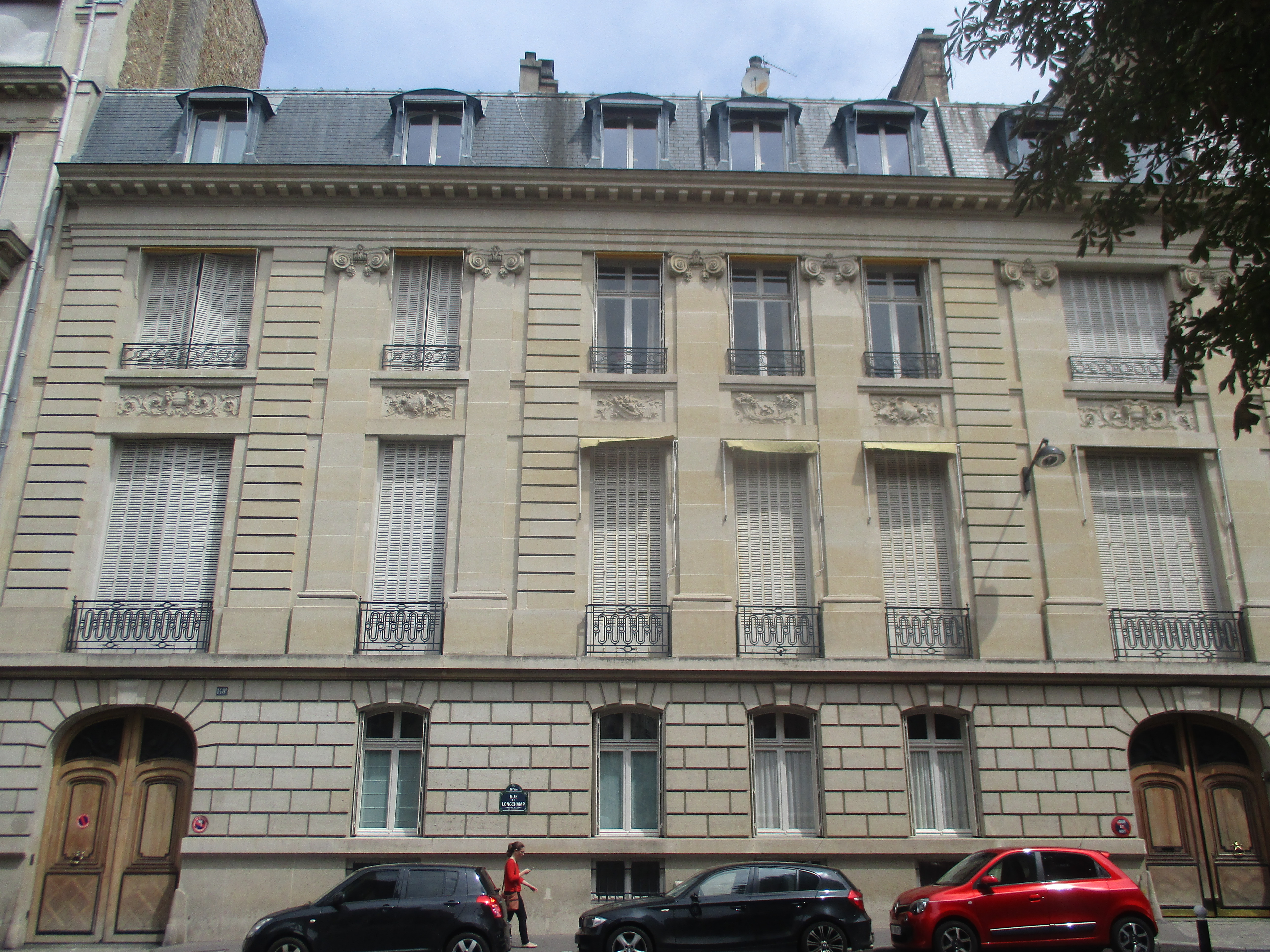 148-148 bis rue de Longchamp, Paris XVIe, où demeura Georges Feydeau.